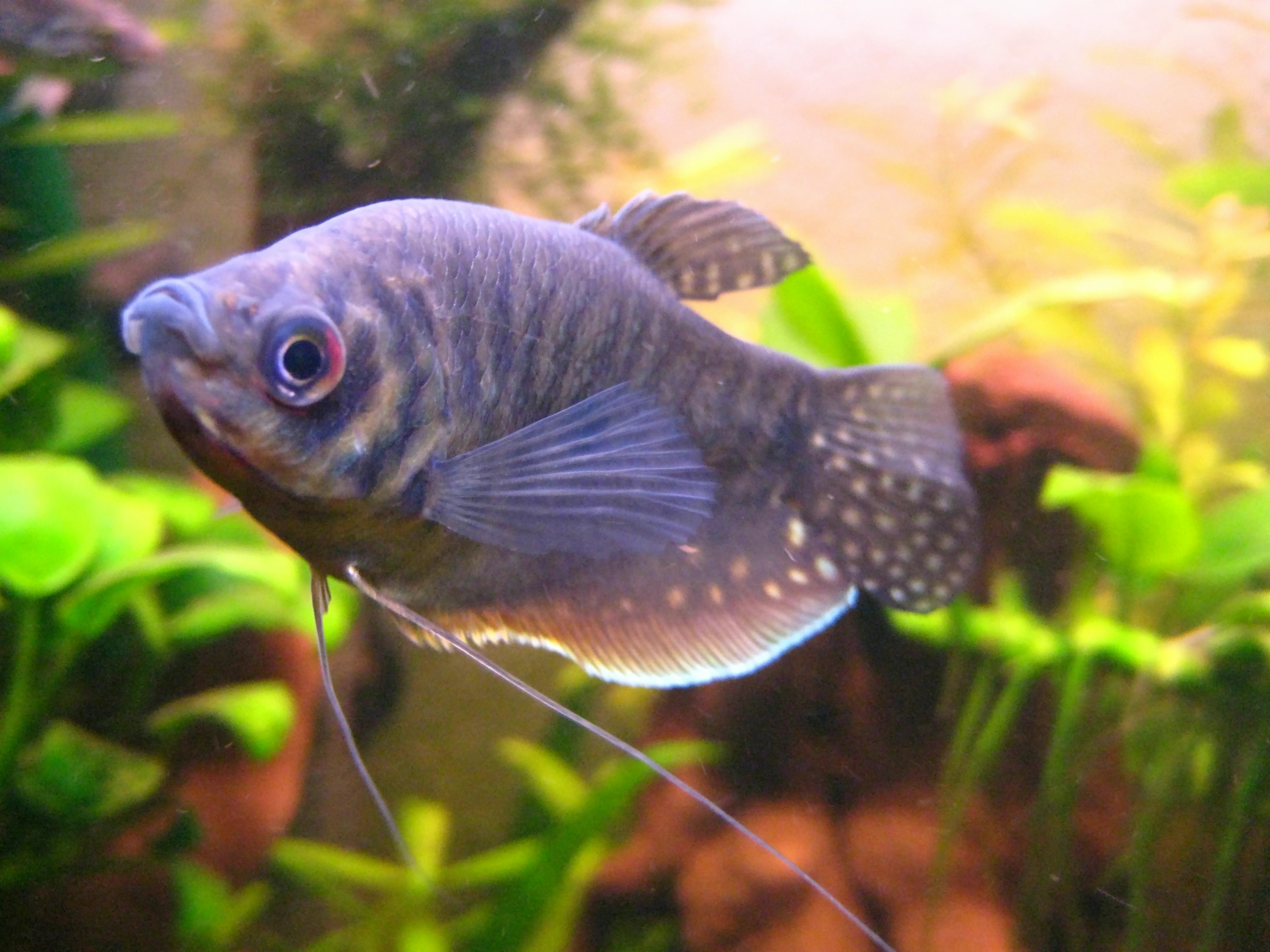 brauner Fadenfisch (Trichogaster trichopterus choco)